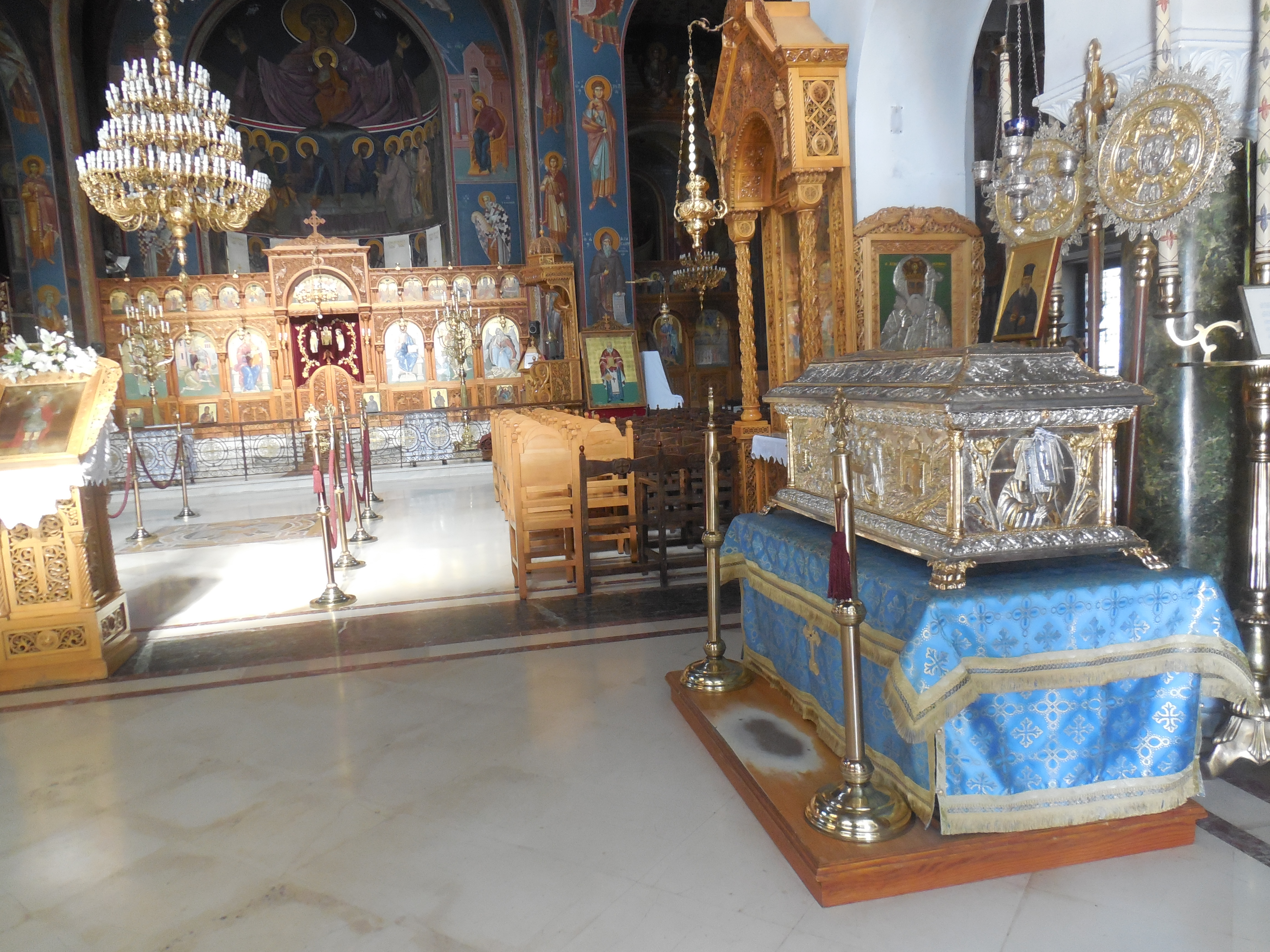 Интерьер храма святого Иоанна «Охотника». Афины. Греция